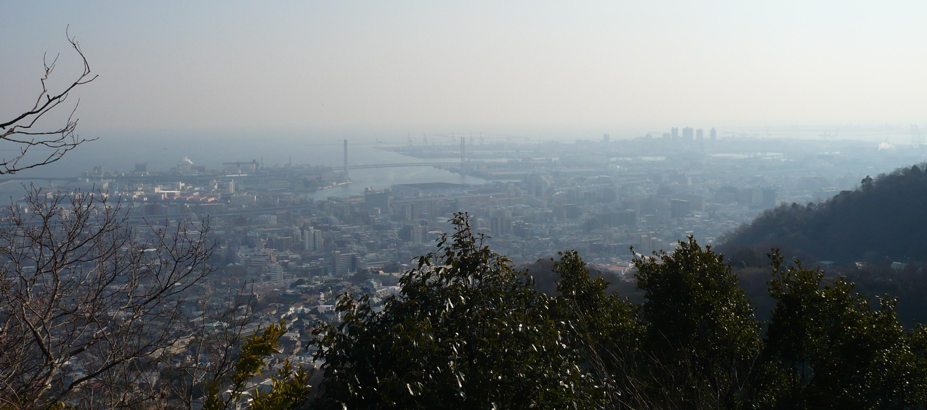 城山山頂部から神戸方面を望む